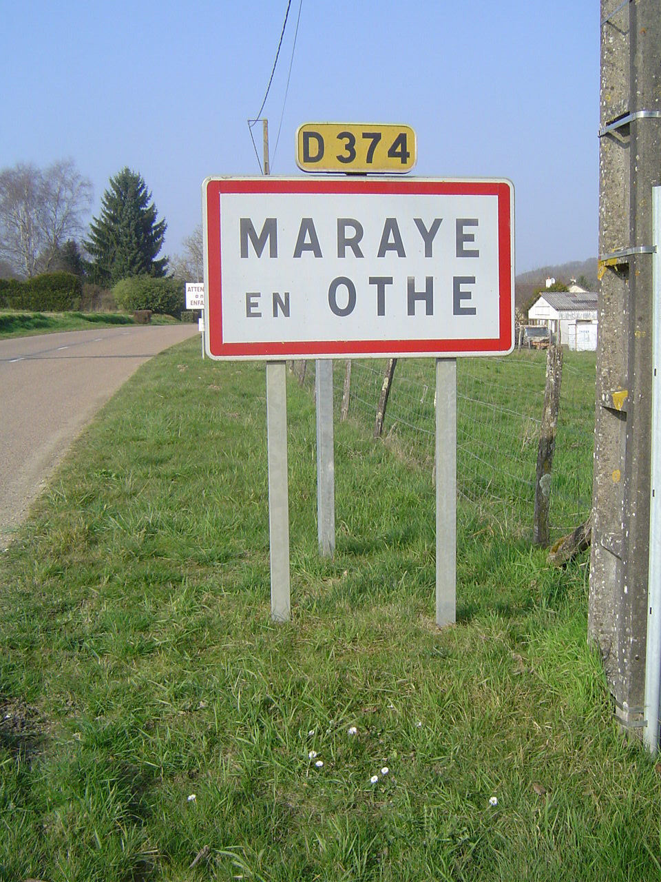 Maraye-en-Othe - Panneau à l'entrée du village